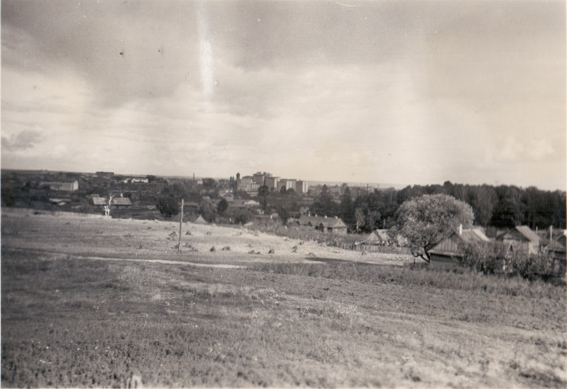 Беларуская (тарашкевіца): Менск (Miensk), Мядзьведжына (Miadźviedžyna)